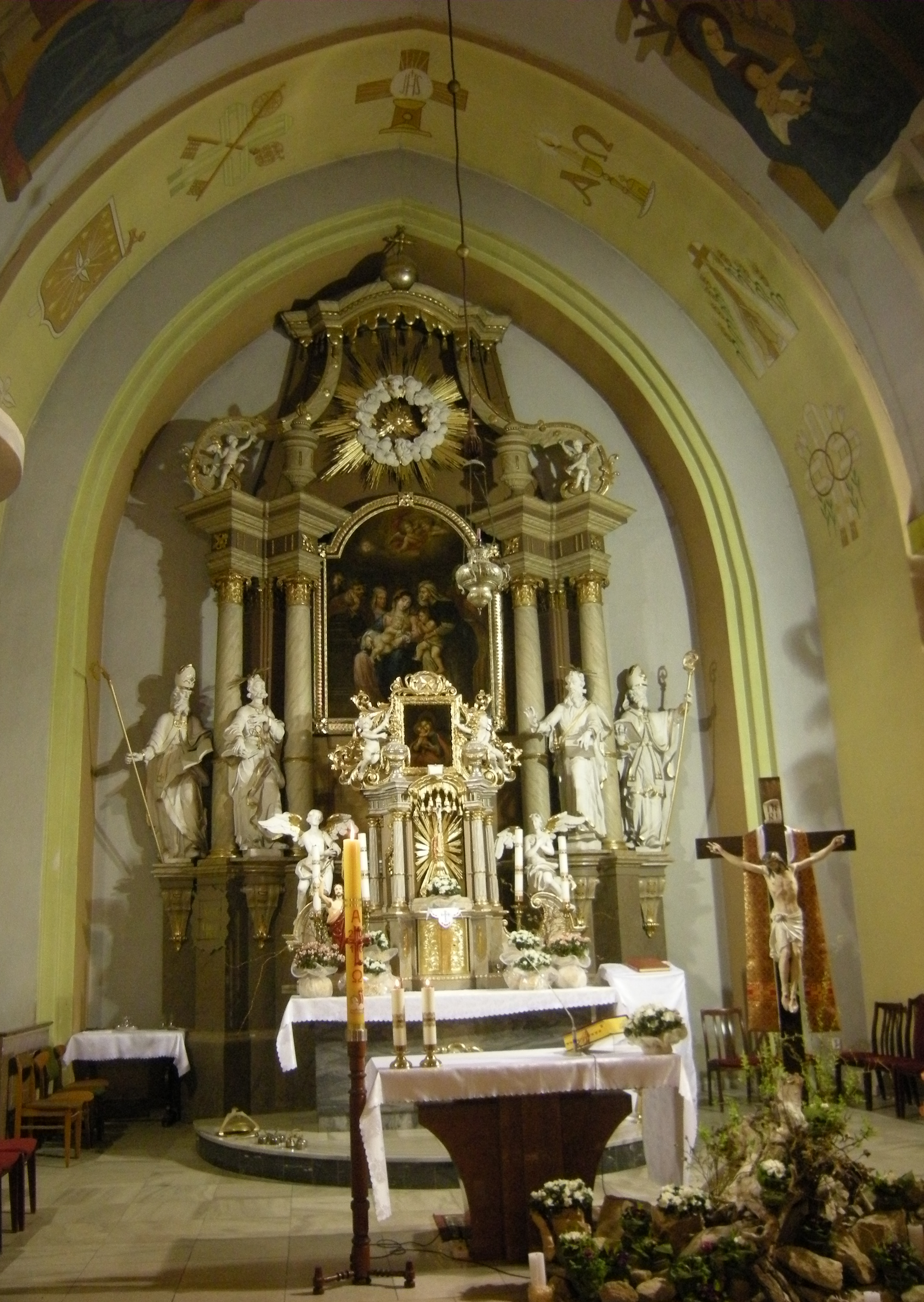 Ołtarz w Kościele NMP w Kałkowie